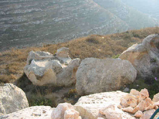 Altar near Giv'at Har'el